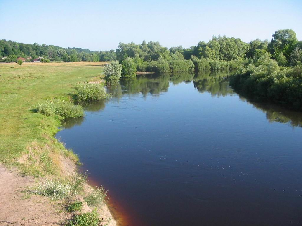 Snov river (Sedniv, Ukraine) - 2